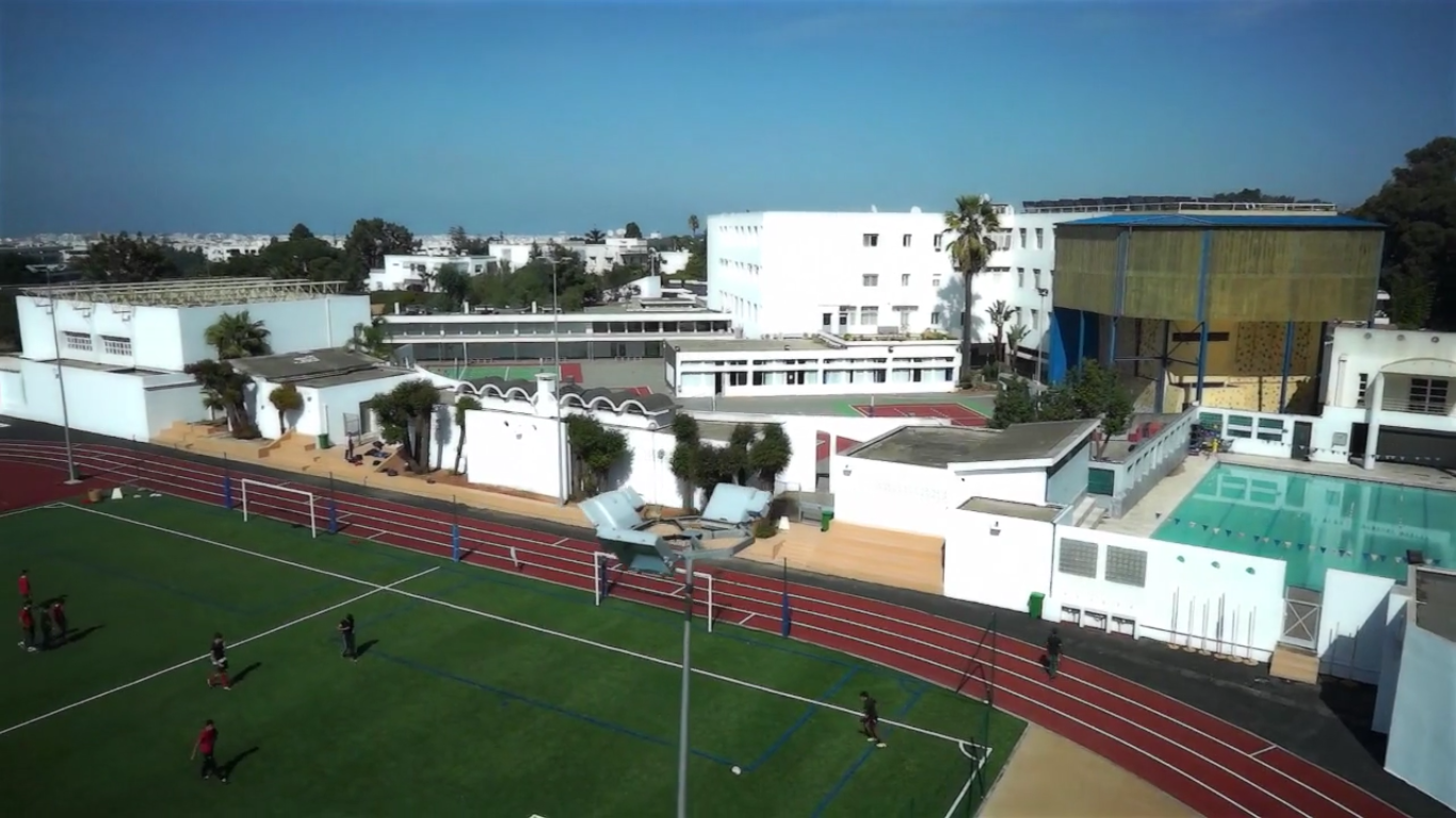 Vue de haut d'une partie du complexe sportif du lycée Descartes en ex-internat